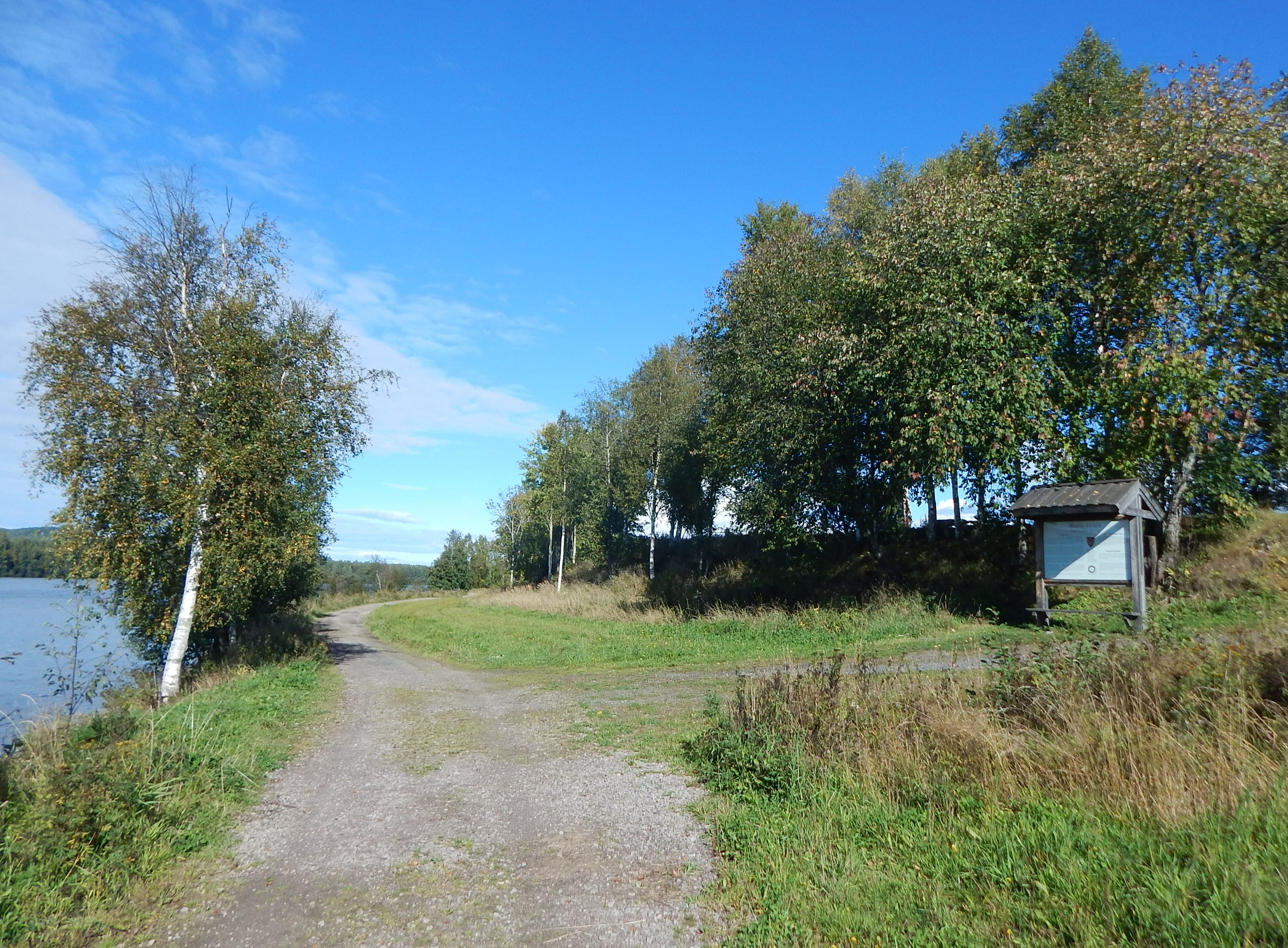 Tursti langs Glomma forbi Lisbettangen i Våler, der det en gang stod en stavkirke